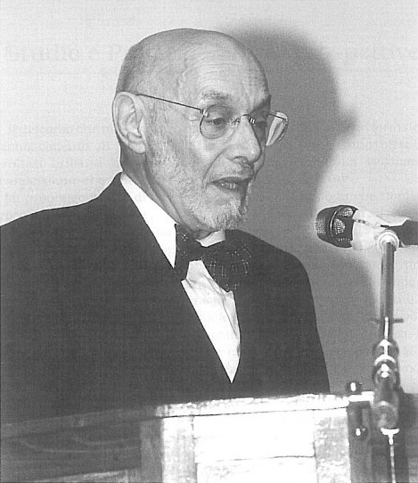 Fotografia di Angelo De Rossi durante una conferenza.